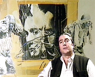 Portrait de Jean-Paul Chambas